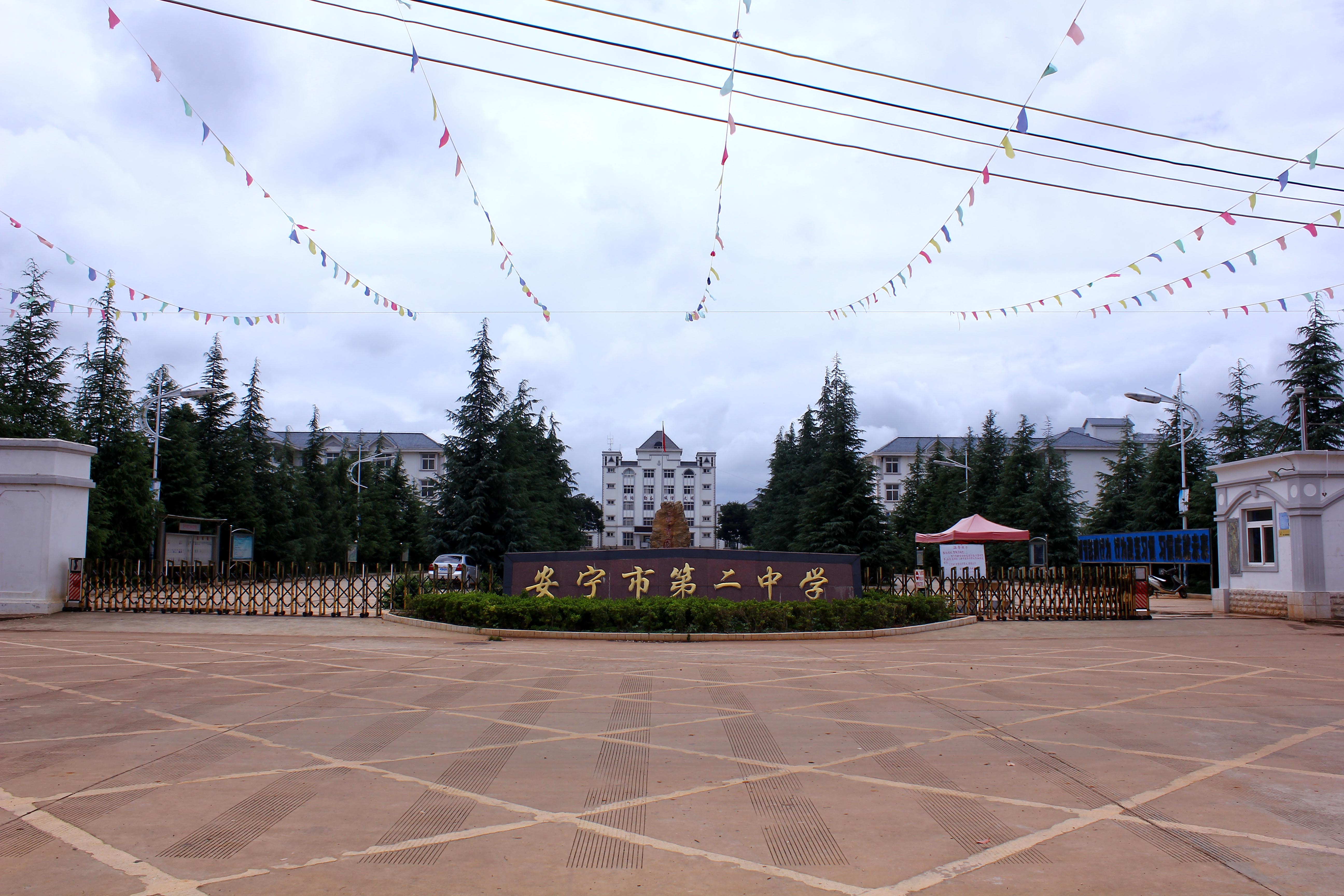 安宁市二中，位于八街街道（原八街镇）。